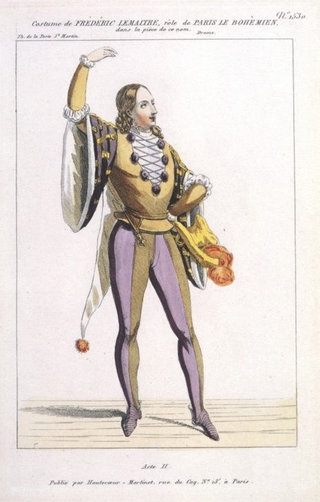 Costume de Frédérick Lemaître pour le rôle de Paris le bohémien. Costume for actor Frédérick Lemaître in Paris le bohémien by Joseph Bouchardy (1810-1870), Théâtre de la Porte Saint-Martin, Paris, 18 avril 1842